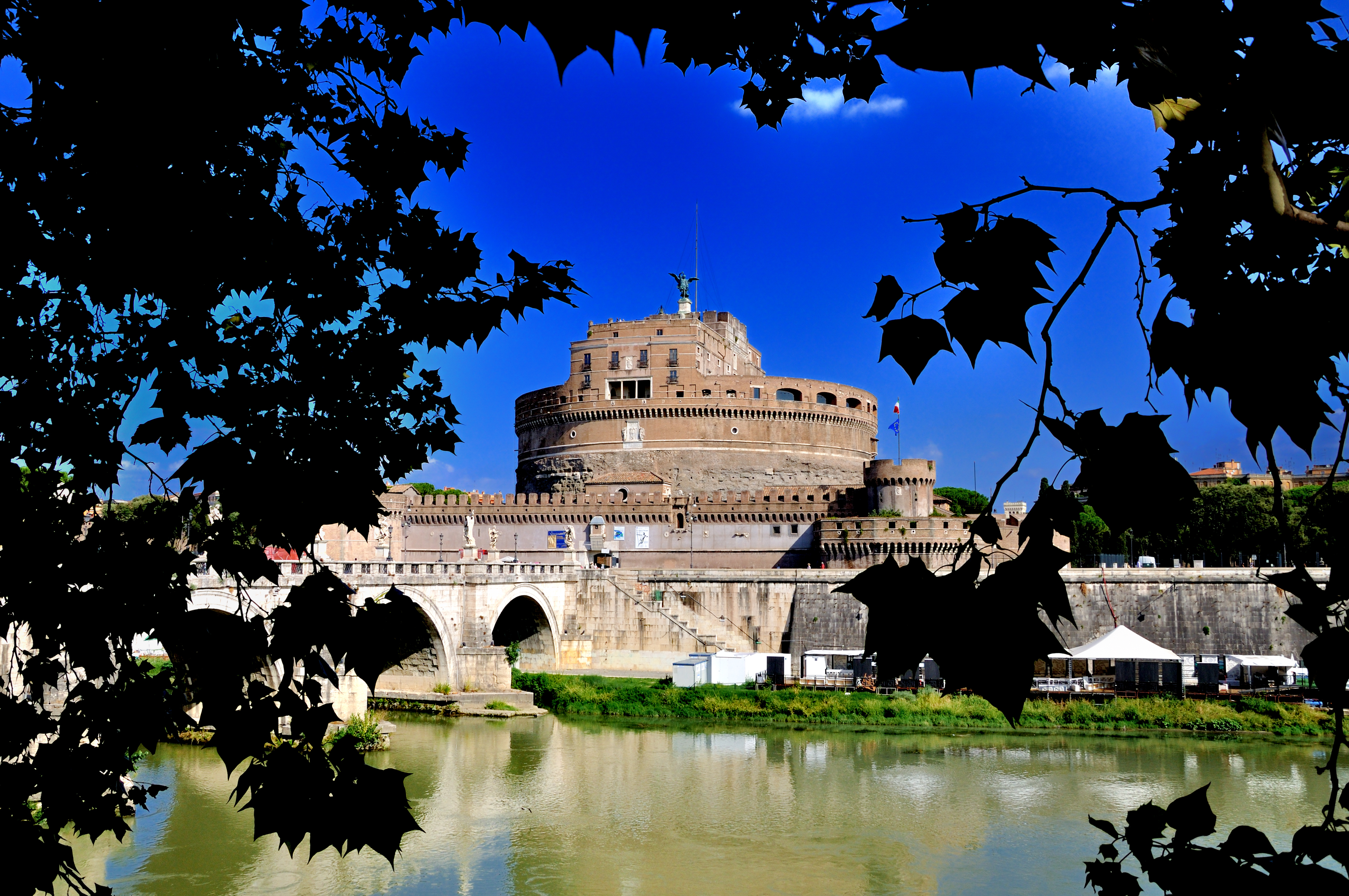 Scorcio su Castel Sant'Angelo